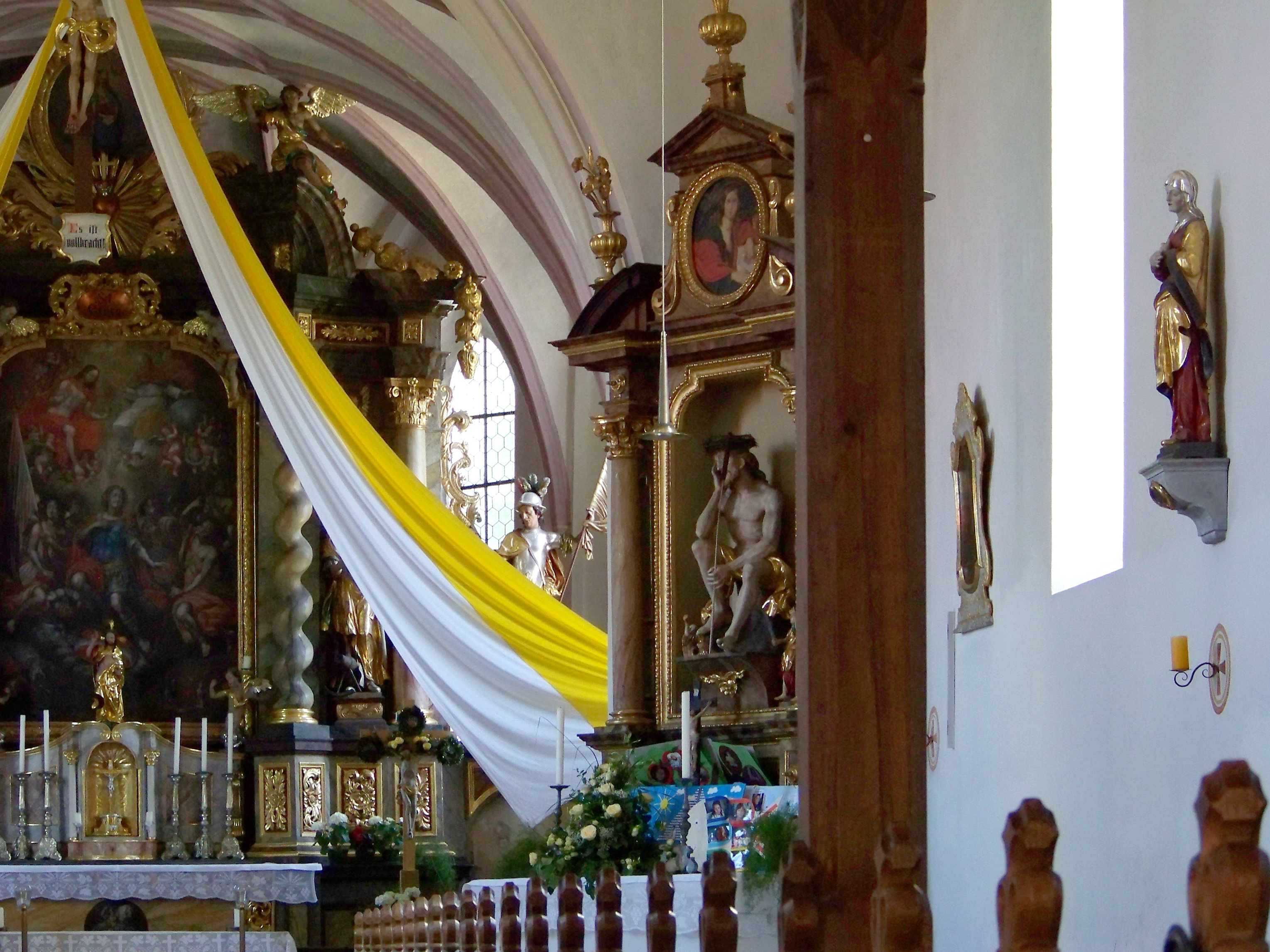 Altdorf bei Landshut. Eugenbach, Kichweg 21. Katholische Pfarrkirche St. Georg. Saalbau aus dem 10. Jahrhundert, westliche Erweiterung 13./14. Jahrhundert. Rechter Seitenaltar mit barocker Schnitzfigur Christus in der Rast.